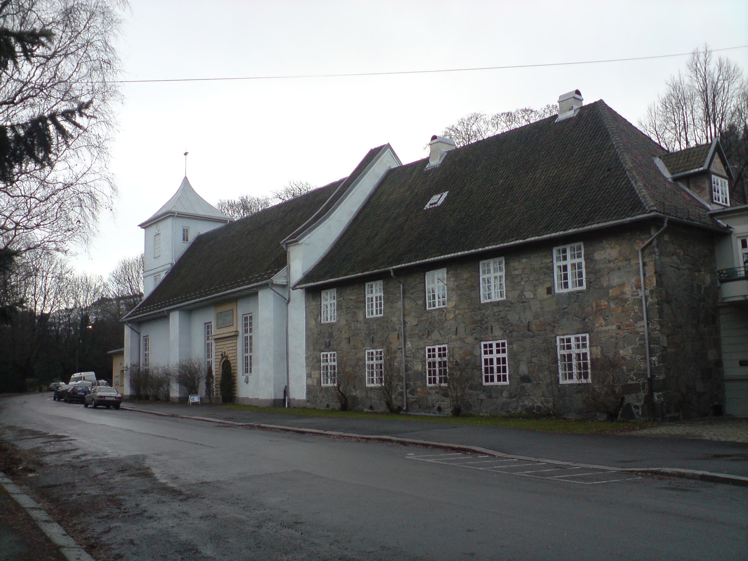 Gamlebyen church